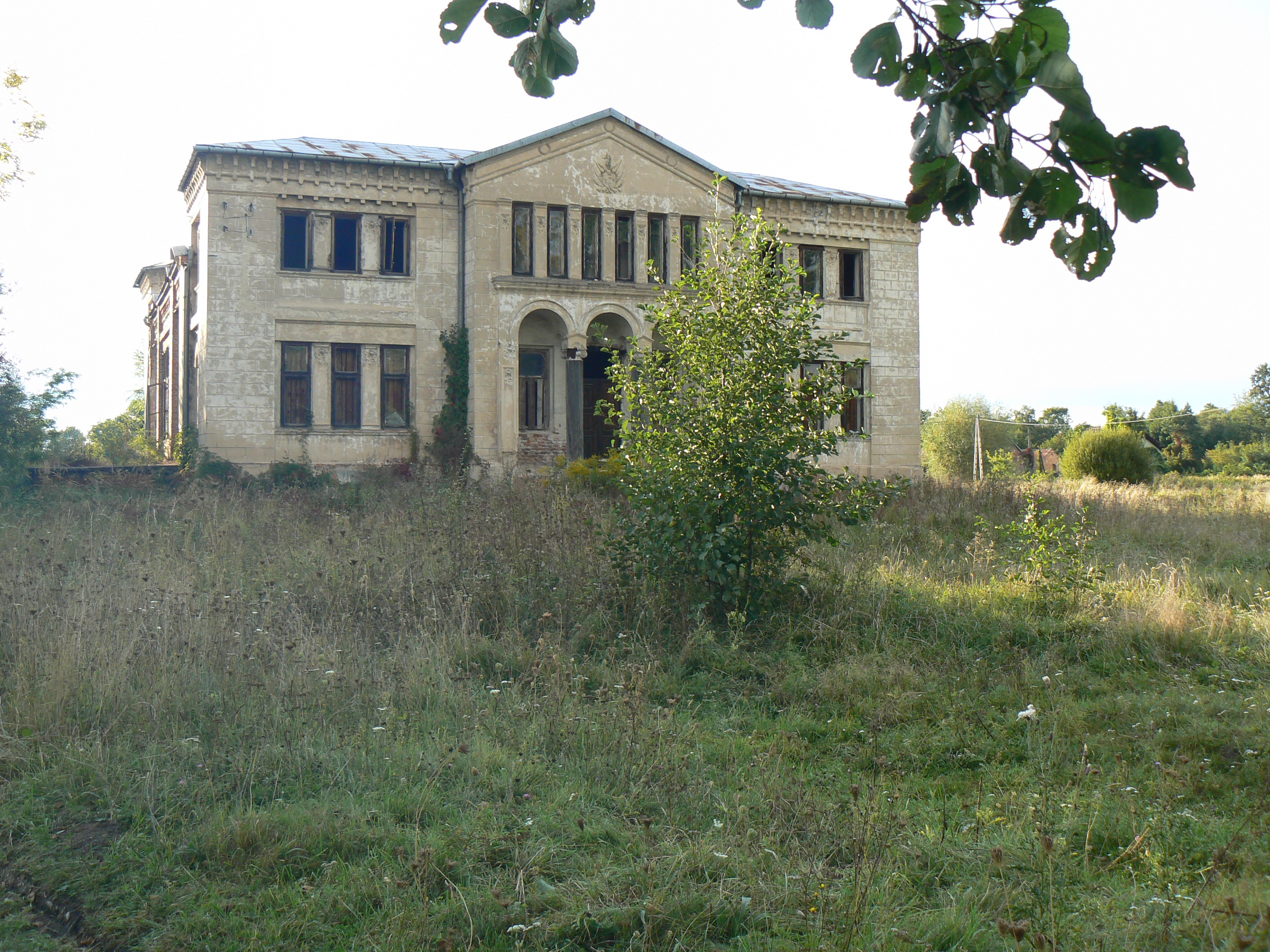 Zaborów - klasycystyczny dwór Dąbskich, XIX